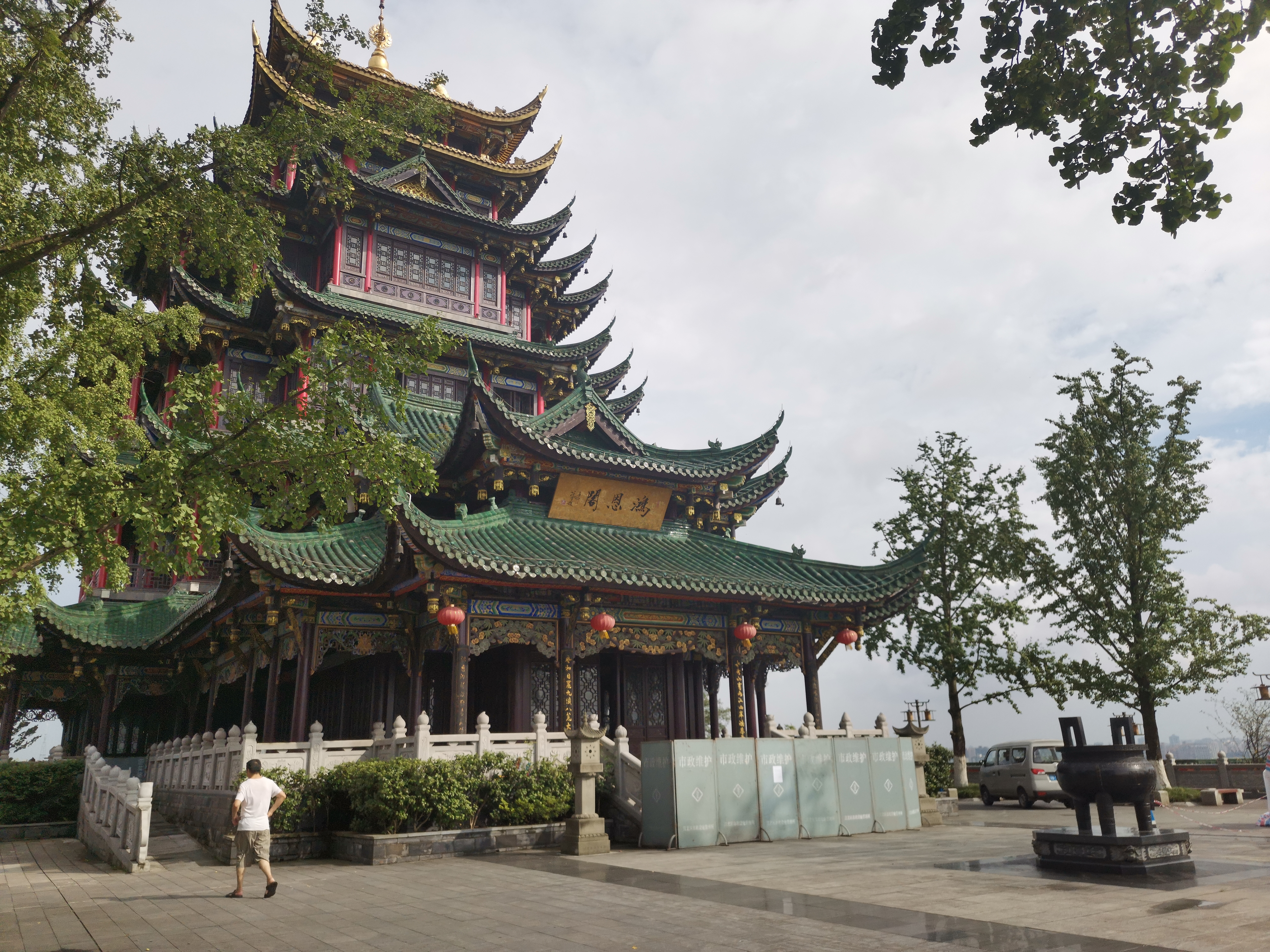 重庆江北区鸿恩寺森林公园鸿恩阁，摄于2020年7月18日。鸿恩阁是七层仿古建筑。